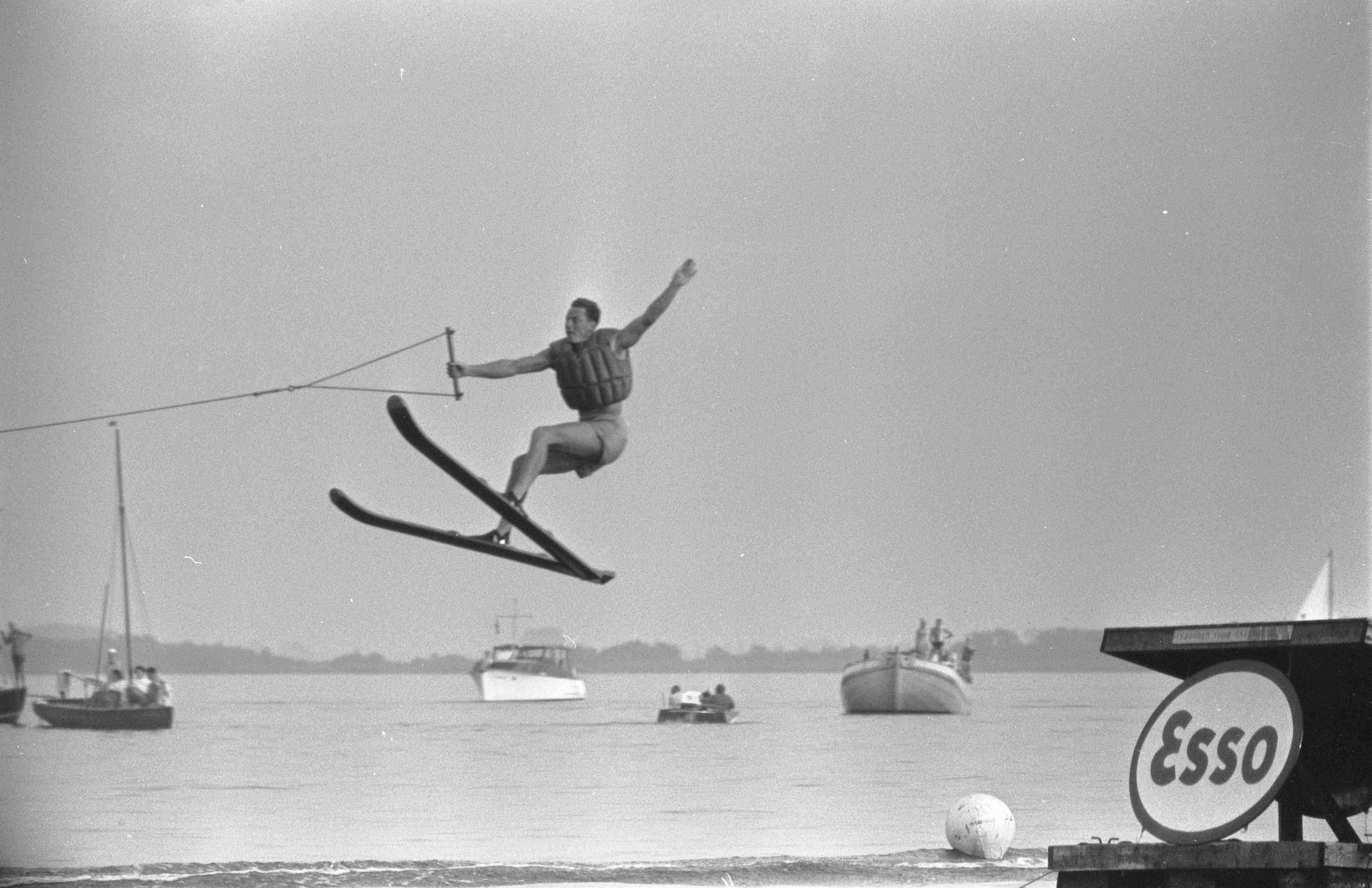 Collectie / Archief : Fotocollectie Anefo Reportage / Serie : [ onbekend ] Beschrijving : Waterski interland Nederland tegen Belgie Datum : 22 augustus 1959 Fotograaf : Rossem, Wim van / Anefo Auteursrechthebbende : Nationaal Archief Materiaalsoort : Negatief (zwart/wit) Nummer archiefinventaris : bekijk toegang 2.24.01.05 Bestanddeelnummer : 910-6199